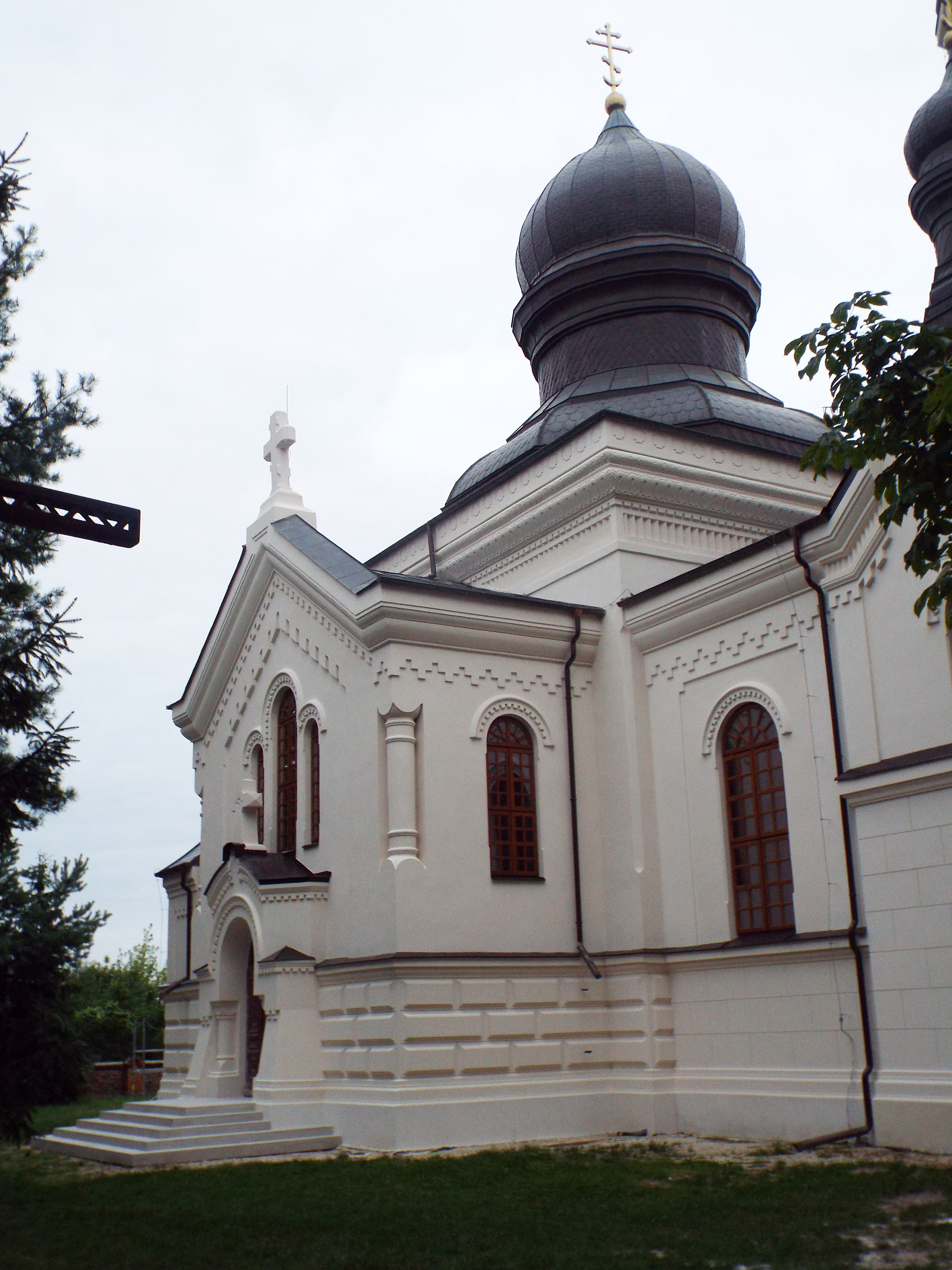 Włodawa – Cerkiew prawosławna pw. Narodzenia Najświętszej Maryi Panny; 1840-1842